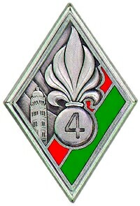 Insigne régimentaire du 4e régiment étranger